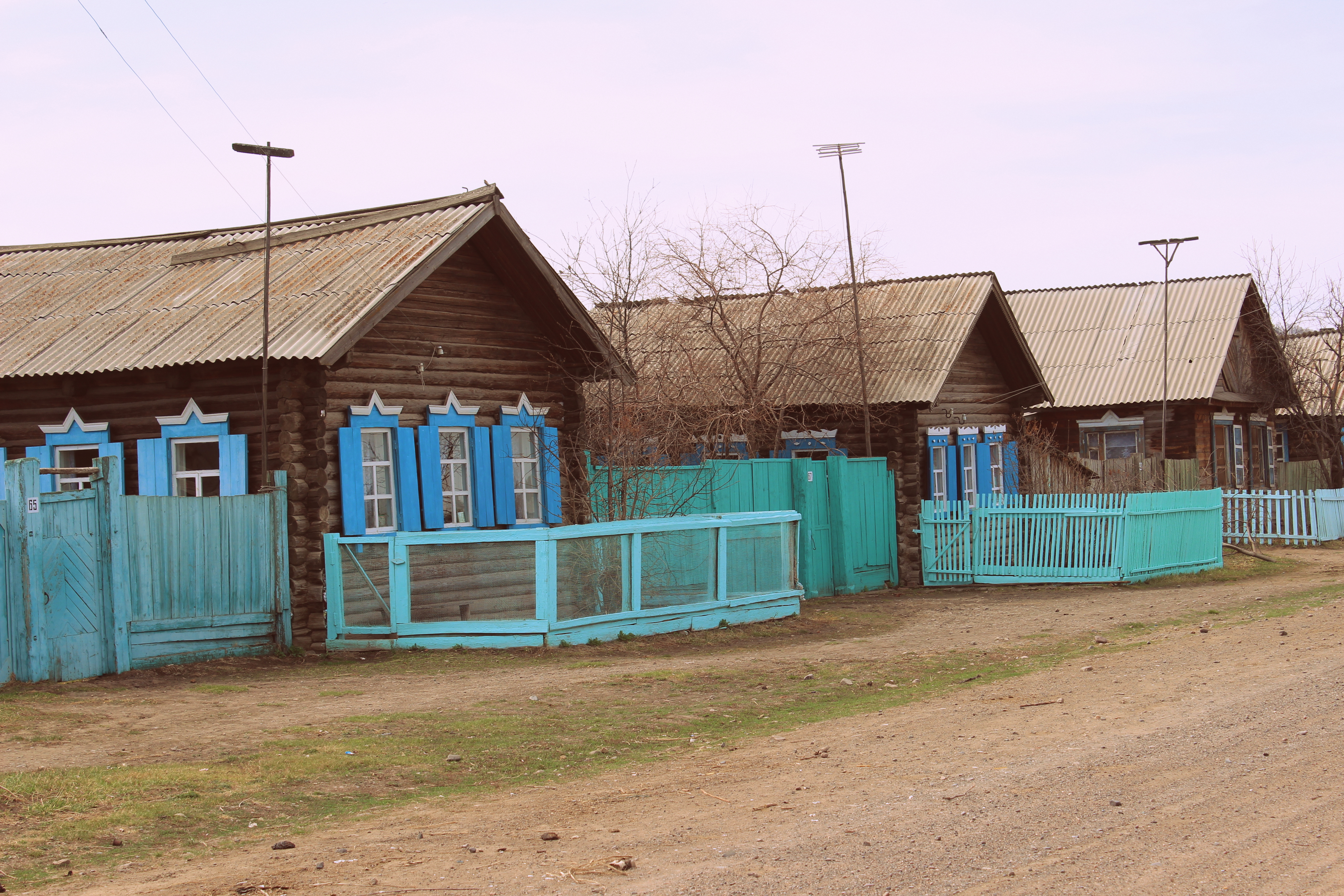 Село Тохой, Джидинский район, Бурятия